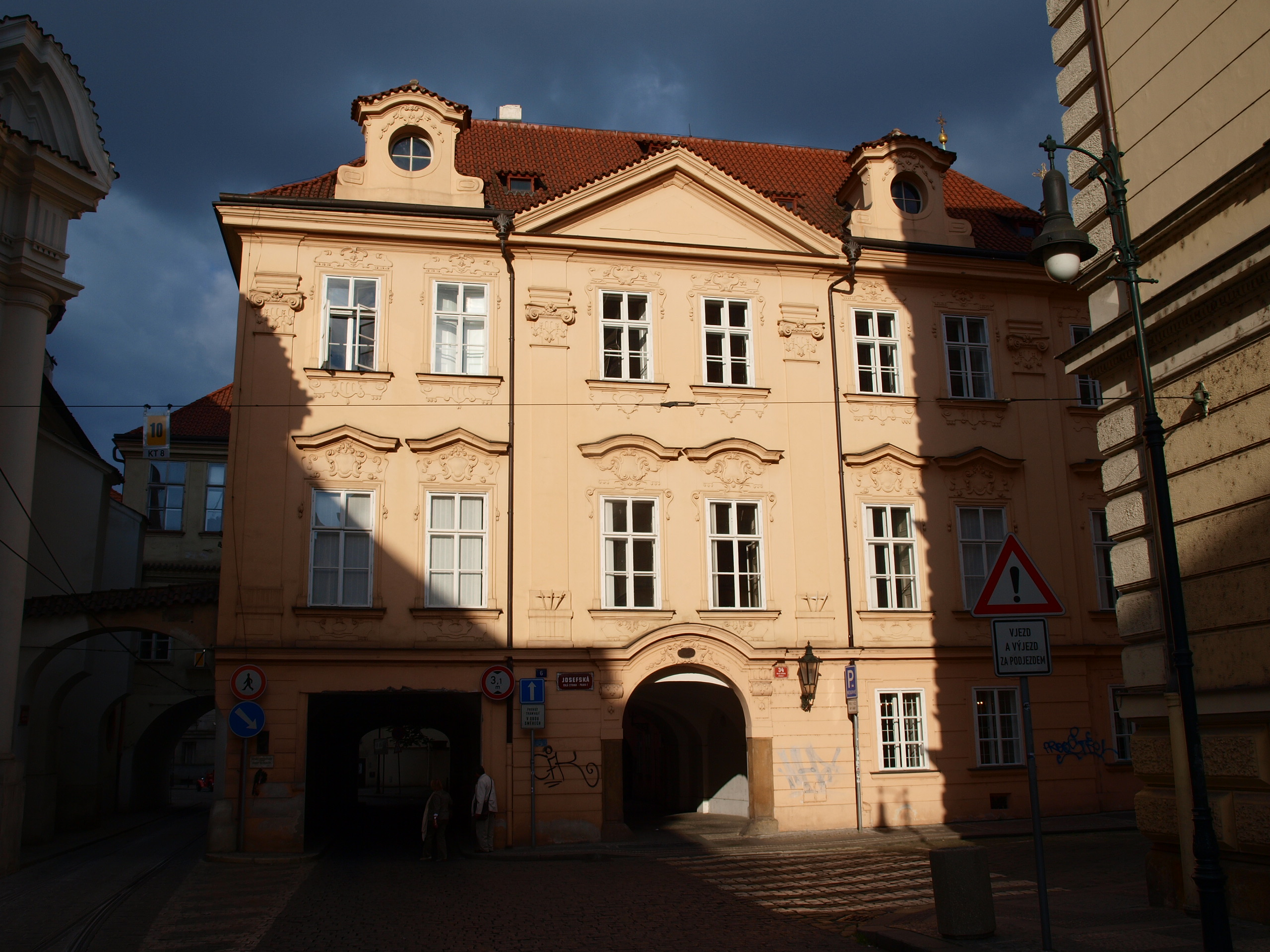 Oettingenský palác